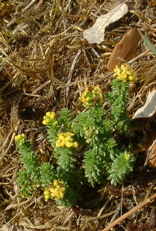 Galium arenarium, Gaillet des sables, Talmont-Saint-Hilaire